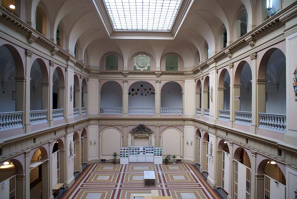 Dawny Sejm Śląski ob. NOT Piłsudskiego 74, Miasto Wrocław - Stare Miasto